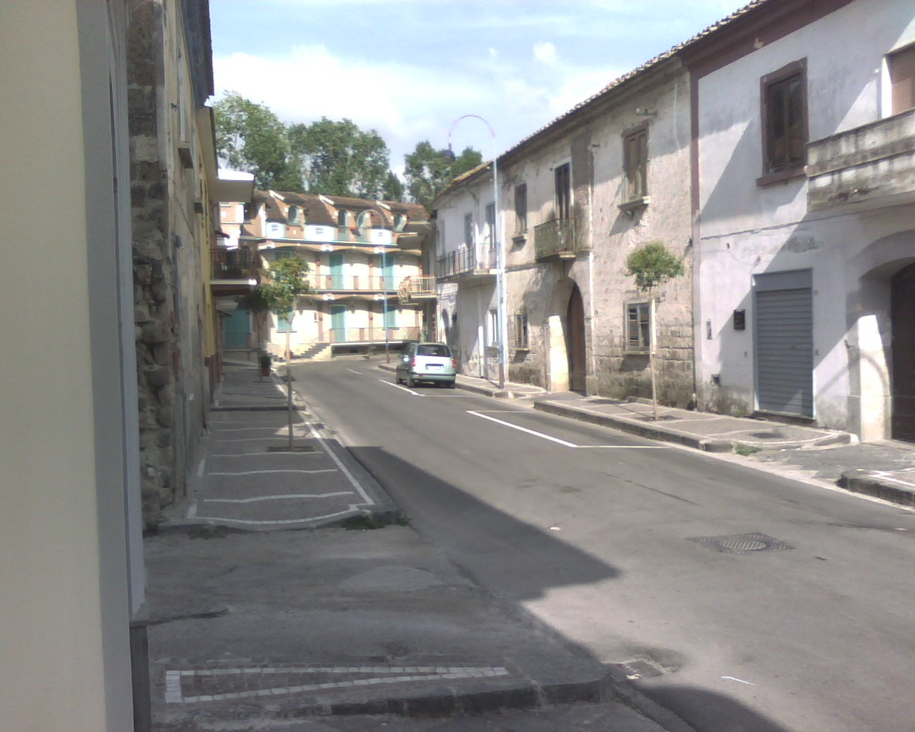 via S. Giovanni (vista est)